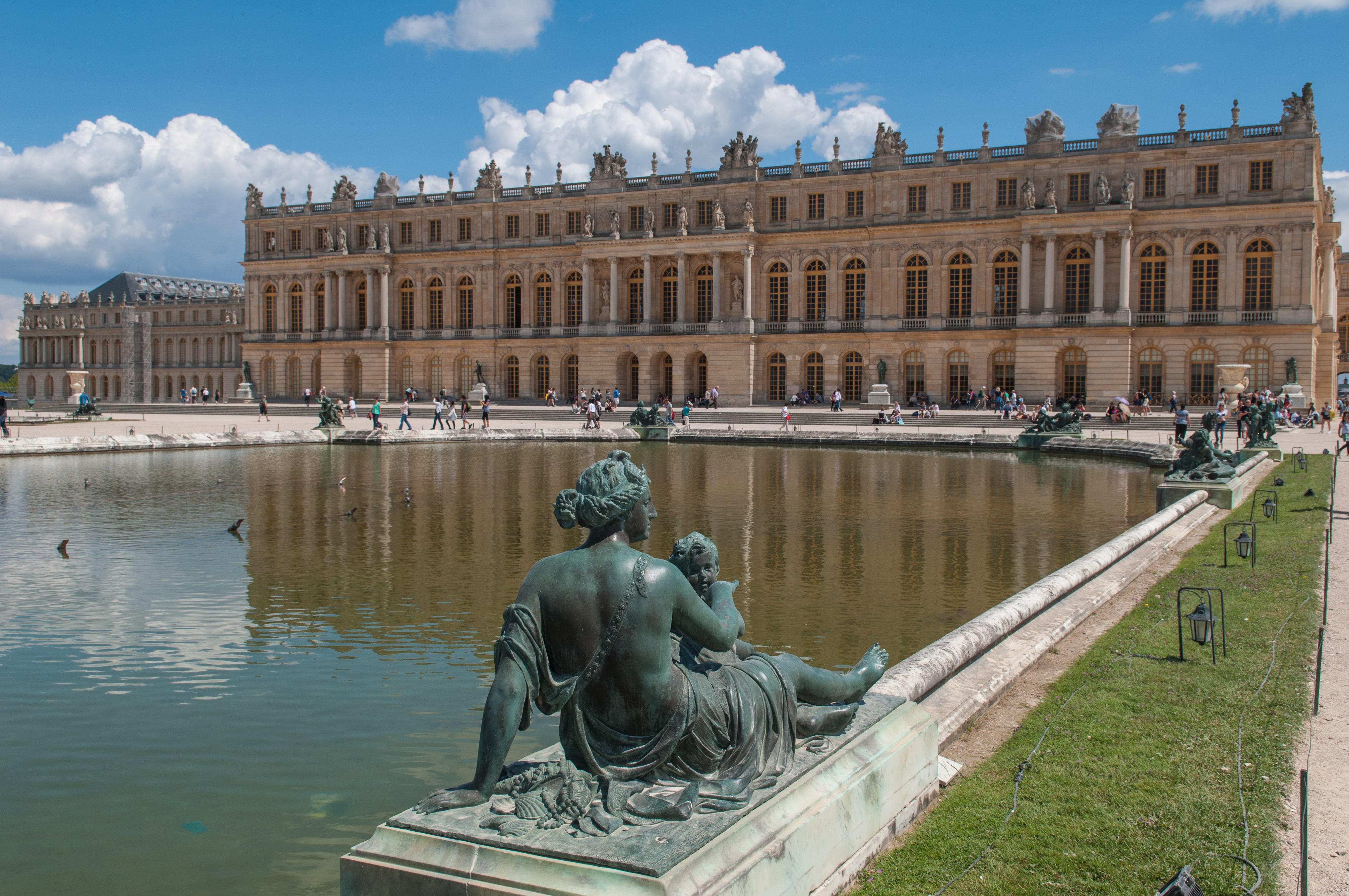 Chateau de Versailles, France